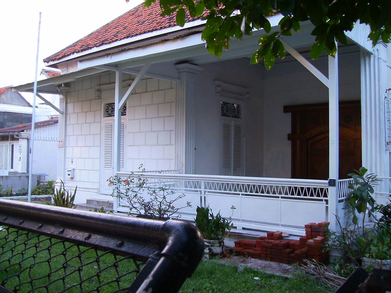 Surabaya Synagogue in 2007.